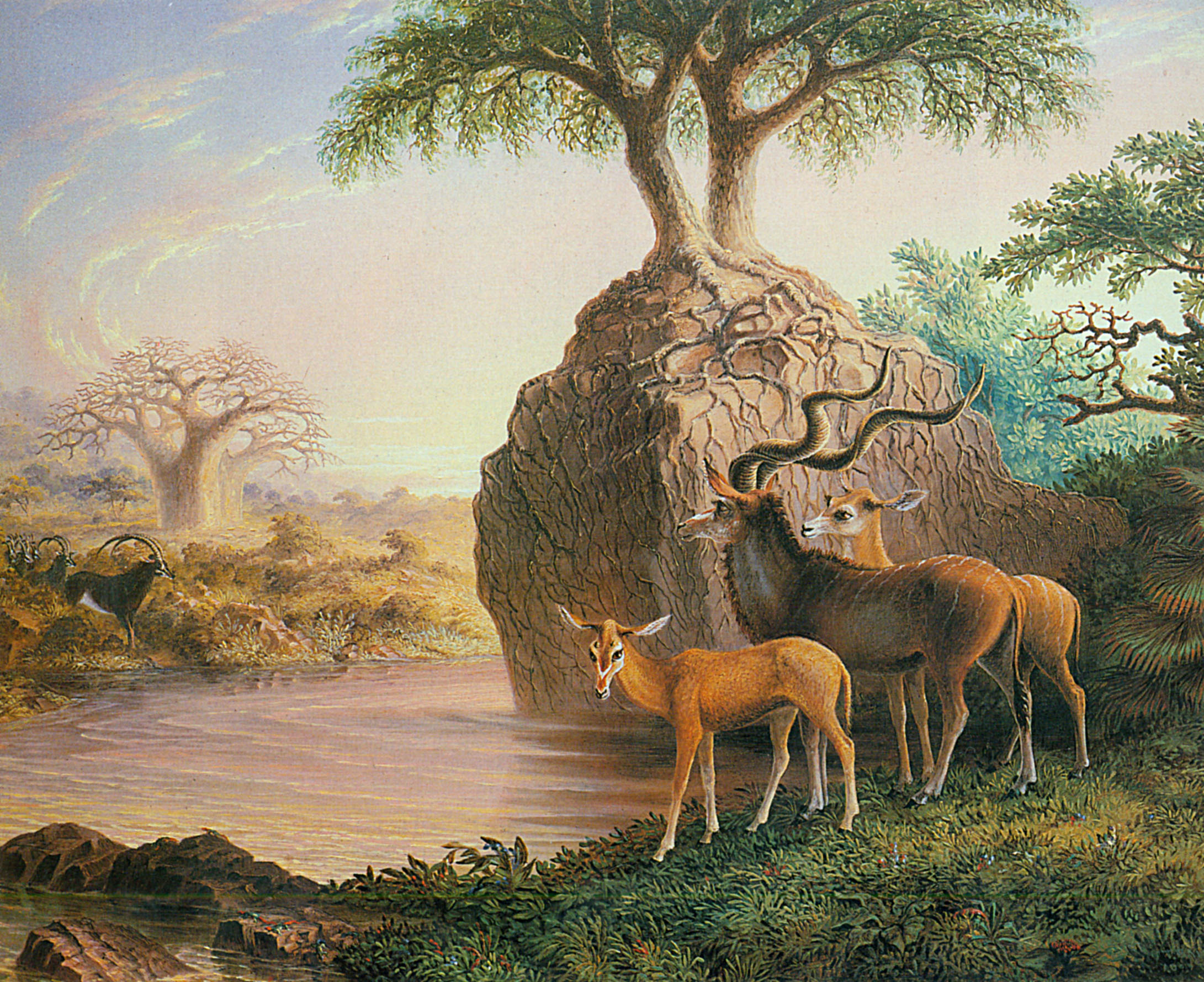 Koodos, Luisi River, Zambesi Valley